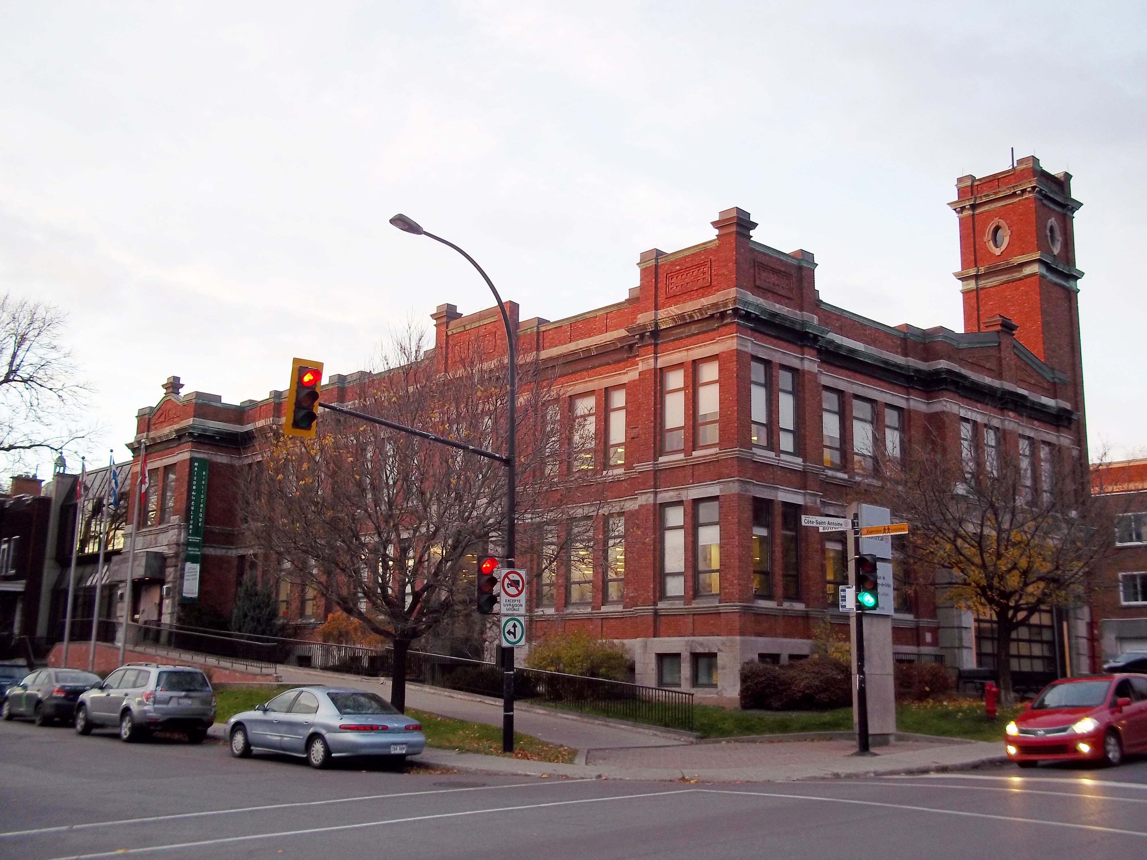 Maison de la culture, Bibliothèque de Notre-Dame-de-Grâce, 3755, rue Botrel, Montréal